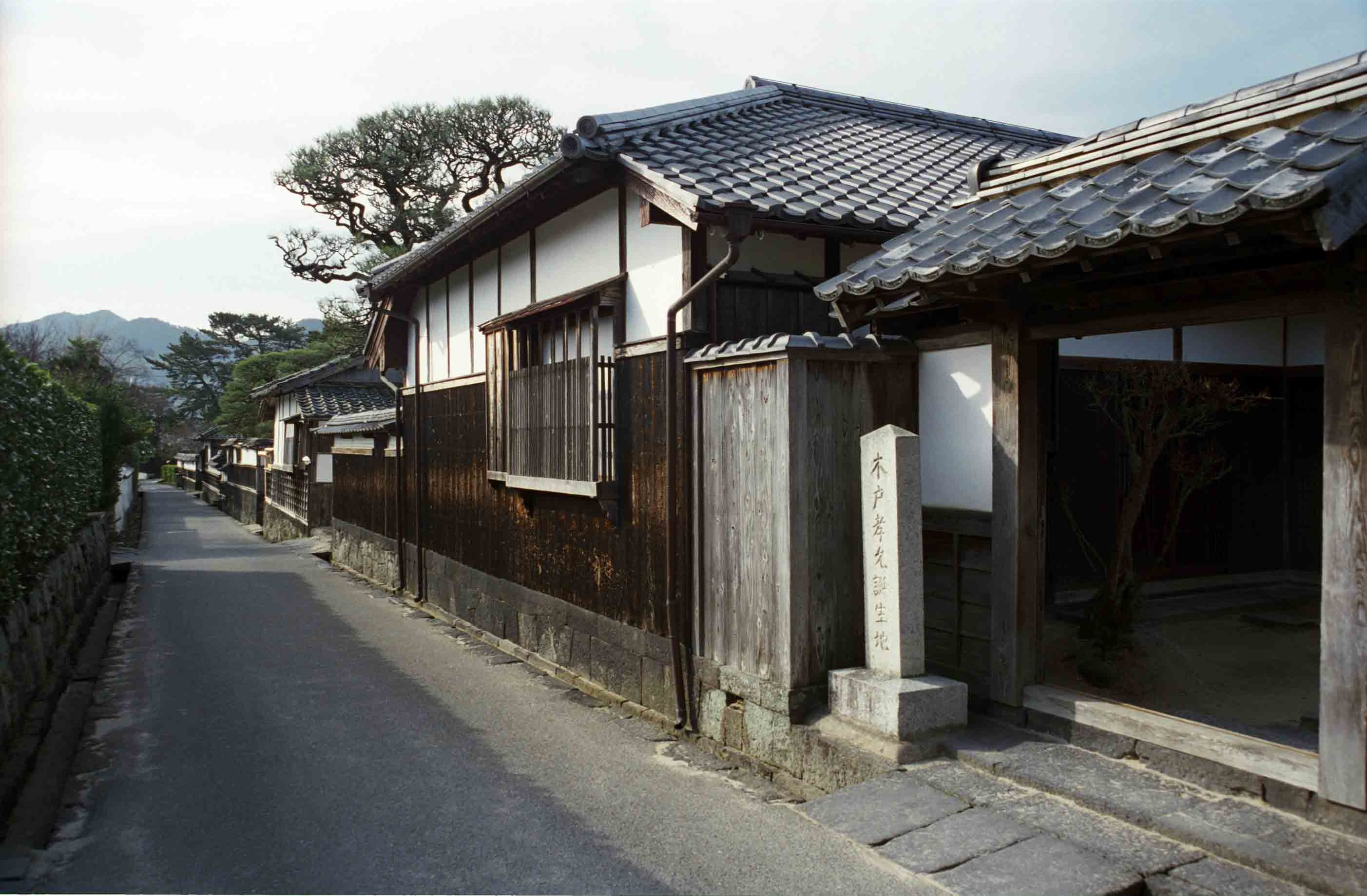 中文（台灣）: 木戶孝允舊宅